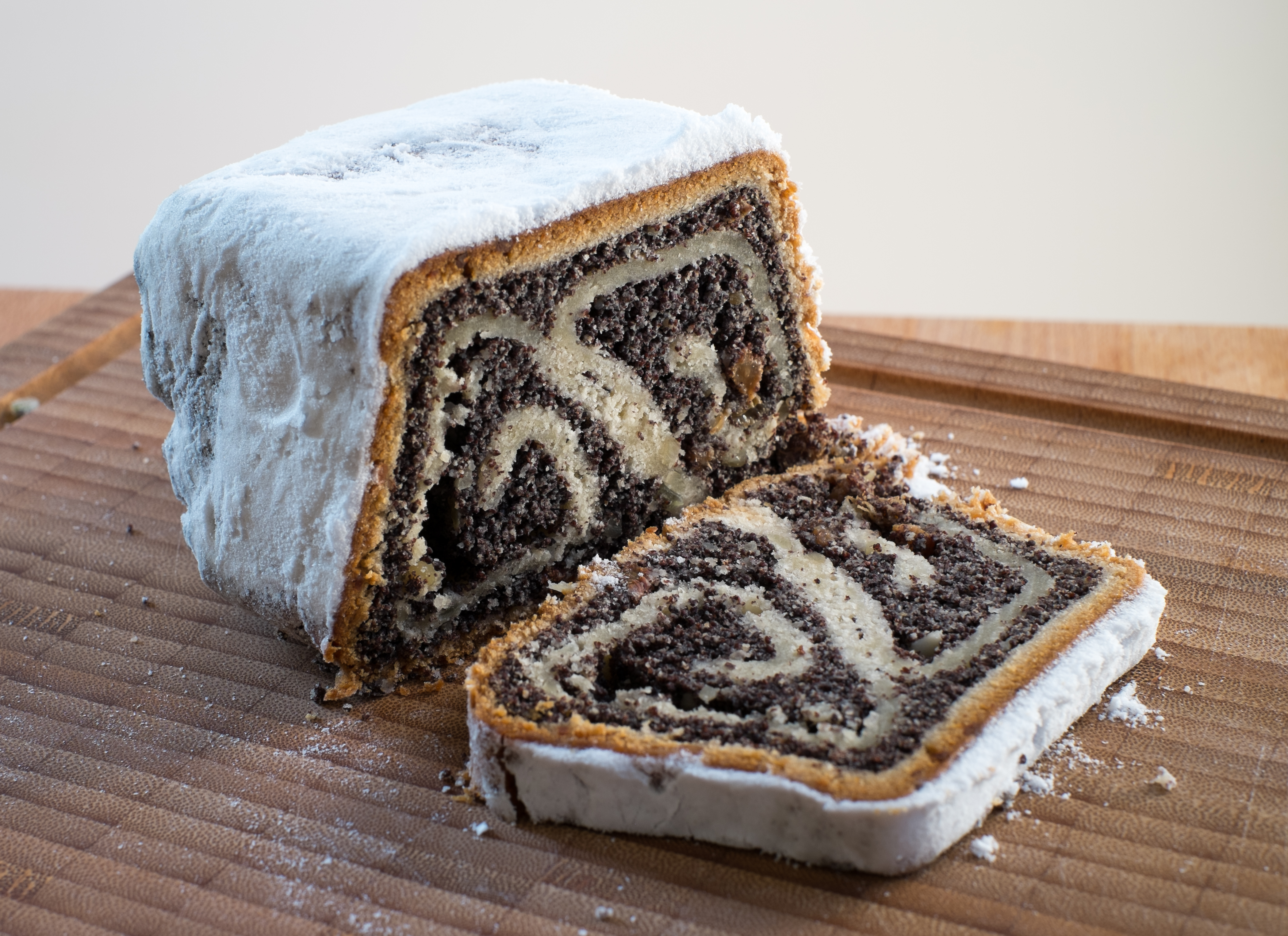 Dresdner Mohnstollen (Konditorei Maaß)